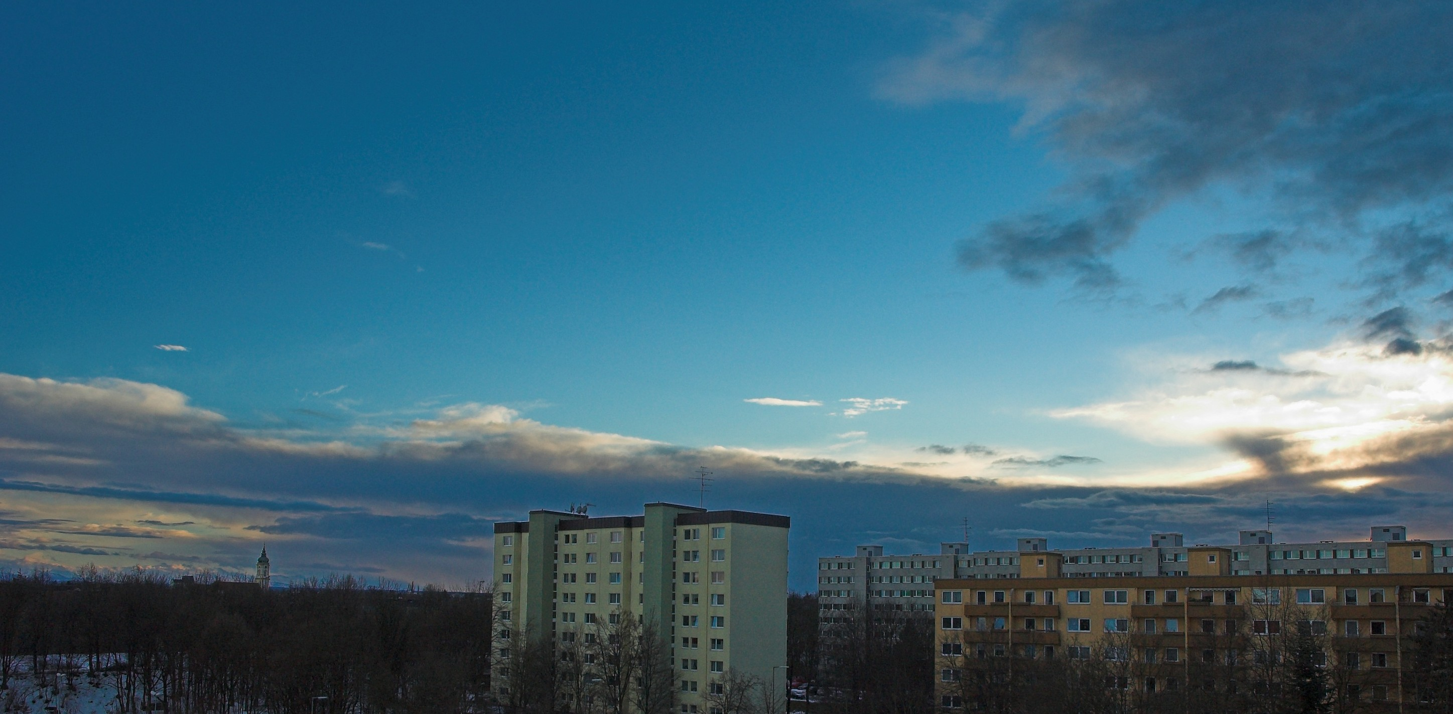 Abendliche Wolkenstimmung in Neuperlach West, München.